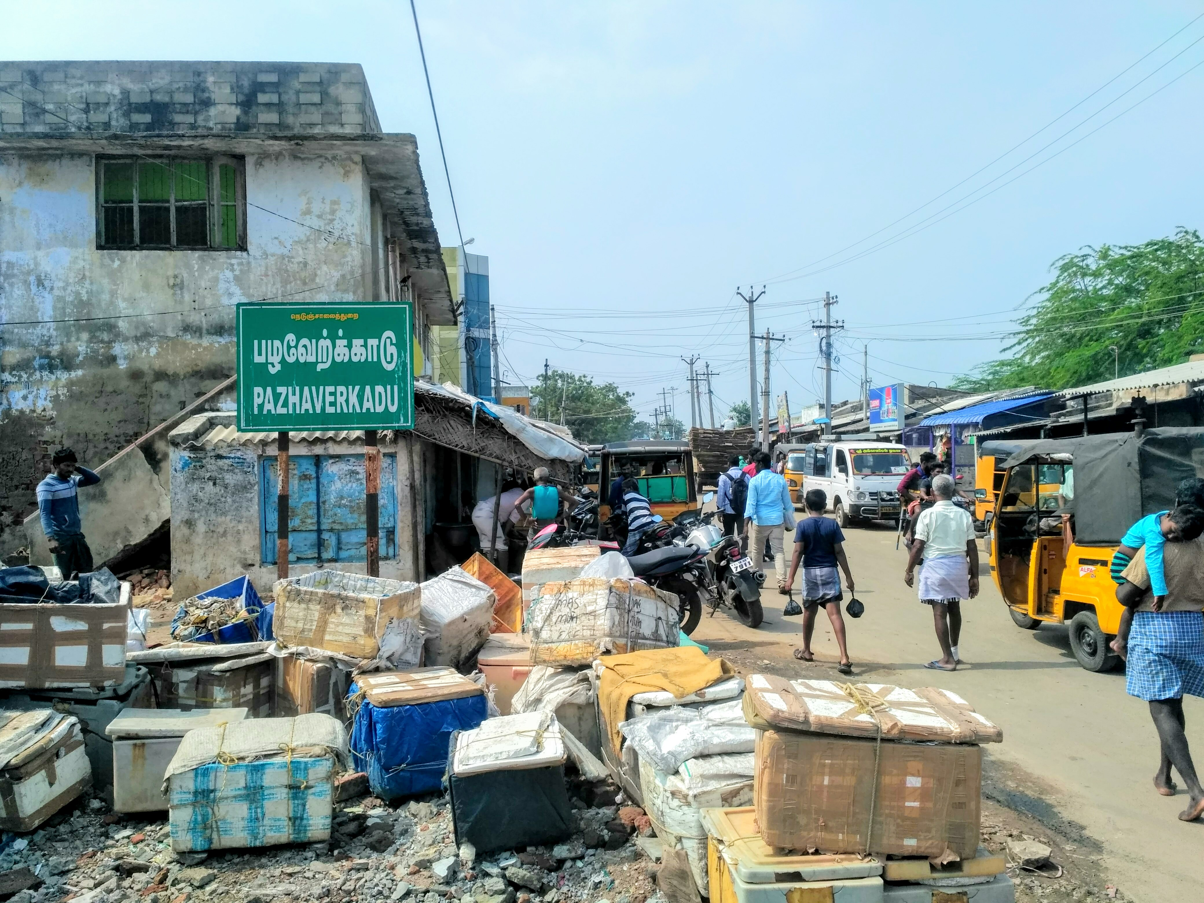 பழவேற்காடு கிராமத்தின் பெயர் பலகை..